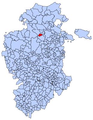 Situación de Padrones de Bureba en el mapa de Burgos.